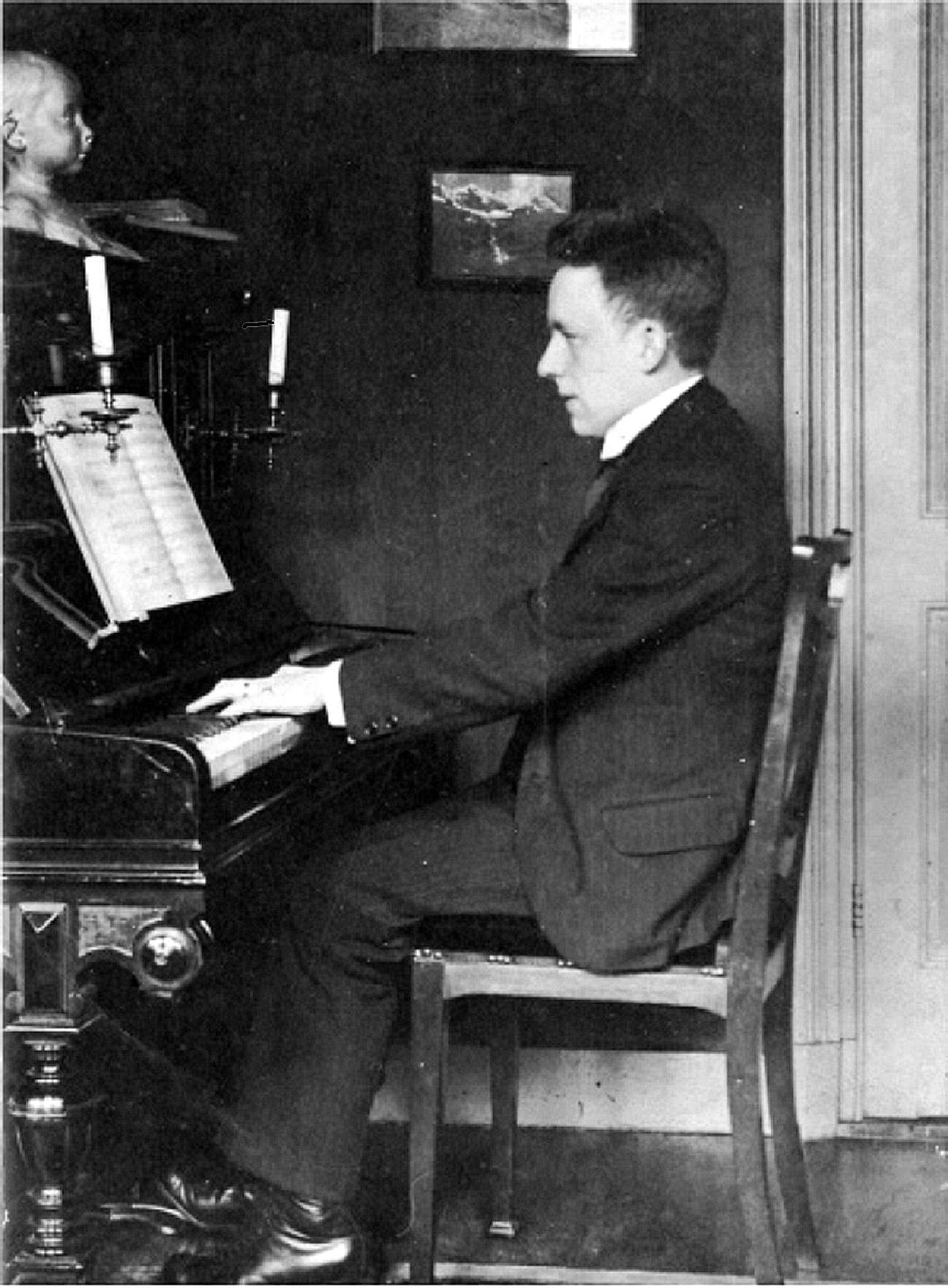 E.J. Dijksterhuis speelt piano tijdens zijn studententijd in Groningen (tussen 1911 en 1918)